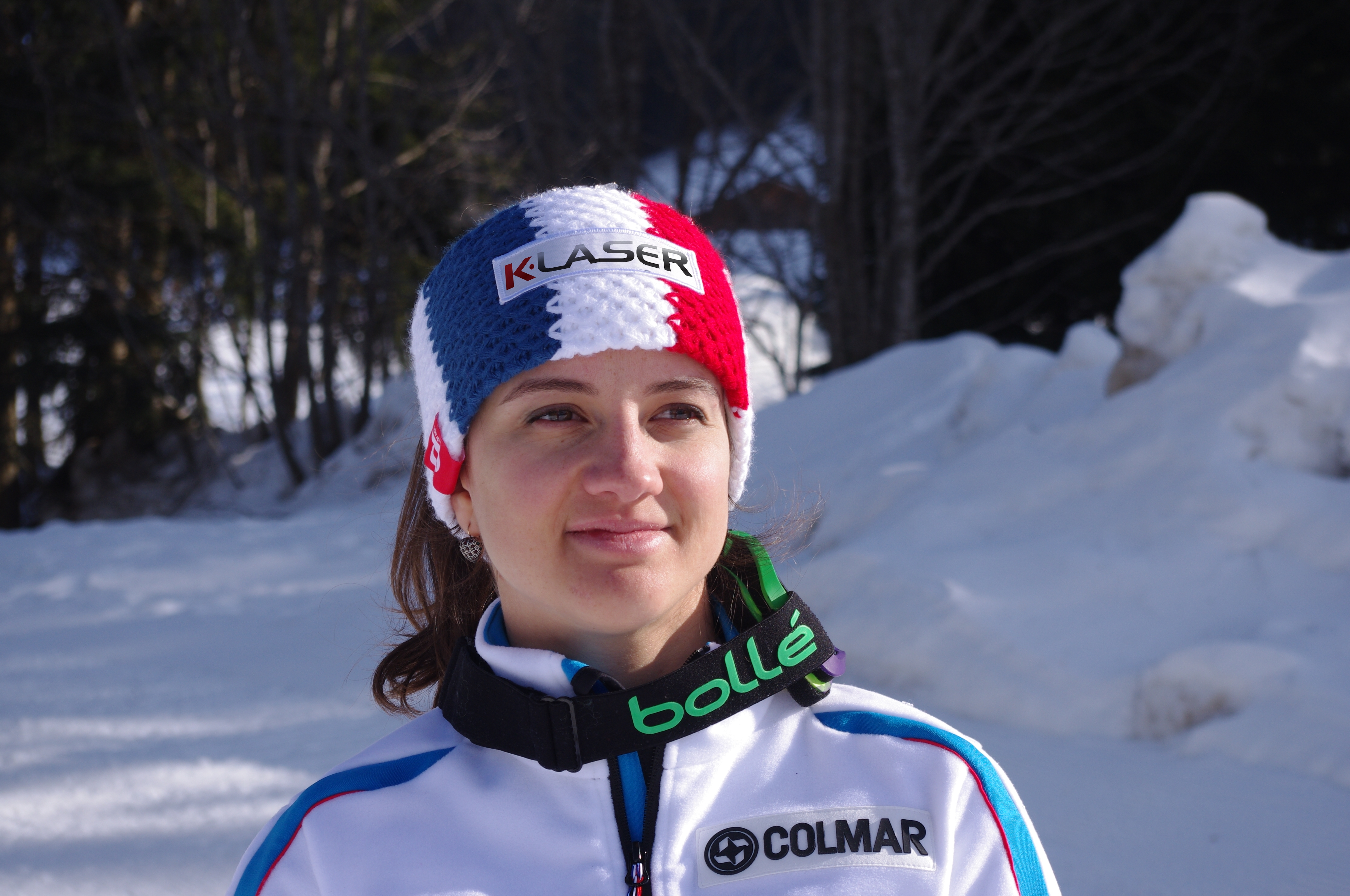 Coralie Frasse Sombet